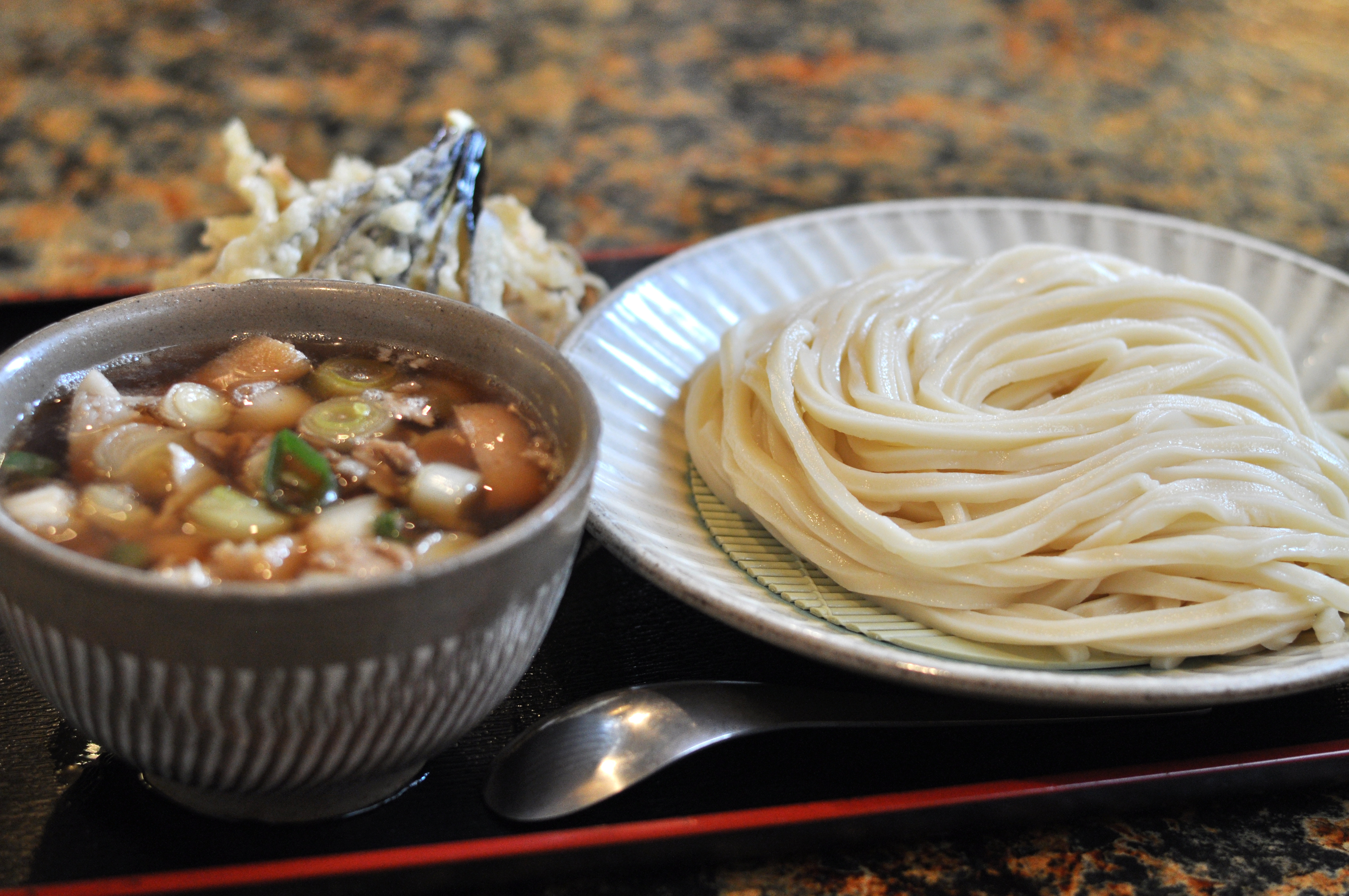 典型的な武蔵野うどんの参考画像 吉川市「製麺練場 風布うどん」の肉汁つけうどん（中）となすごぼう天